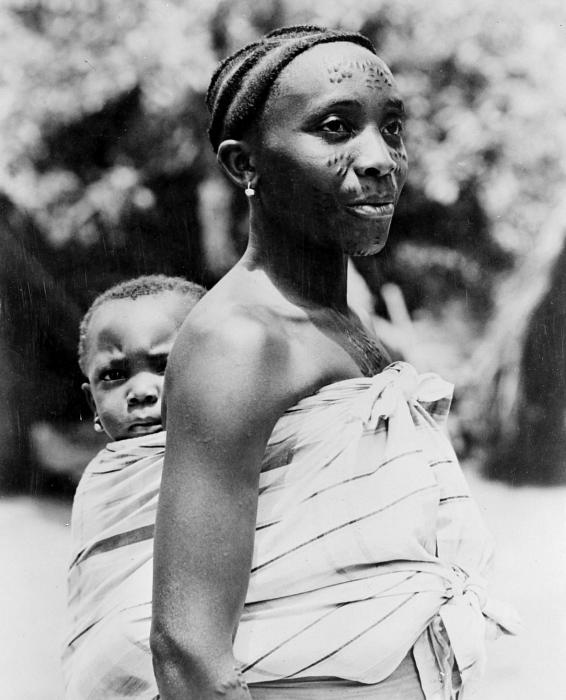 Repronegatief. Een Marronvrouw draagt haar kind op haar rug in een pangi als draagdoek. Dit werd gedaan tijdens het werk op het land of tijdens lange afstanden die te voet afgelegd moesten worden. . Portret van een jonge Marron vrouw met kind